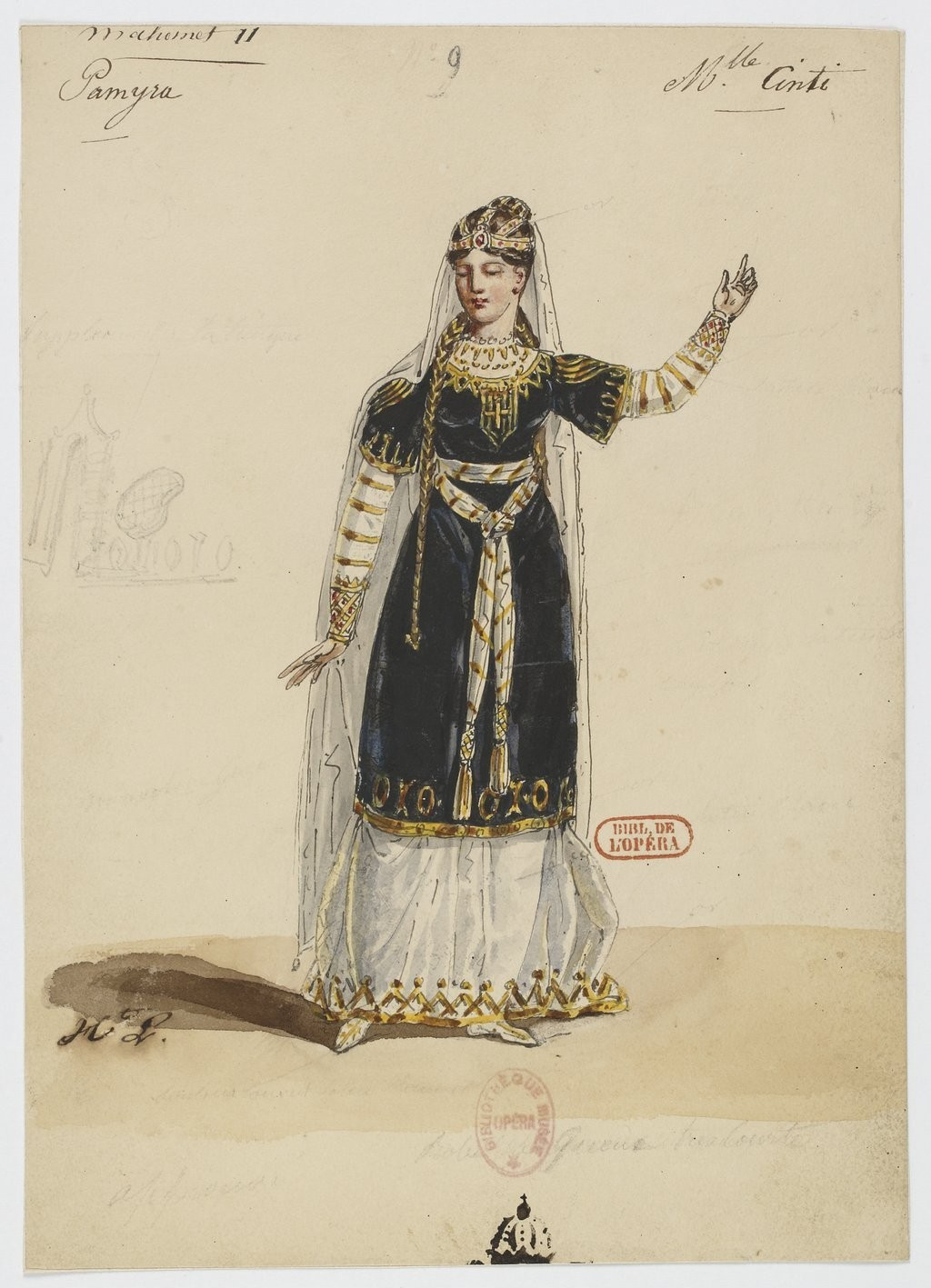 Maquette d'un costume de Pamyra par Hippolyte Lecomte